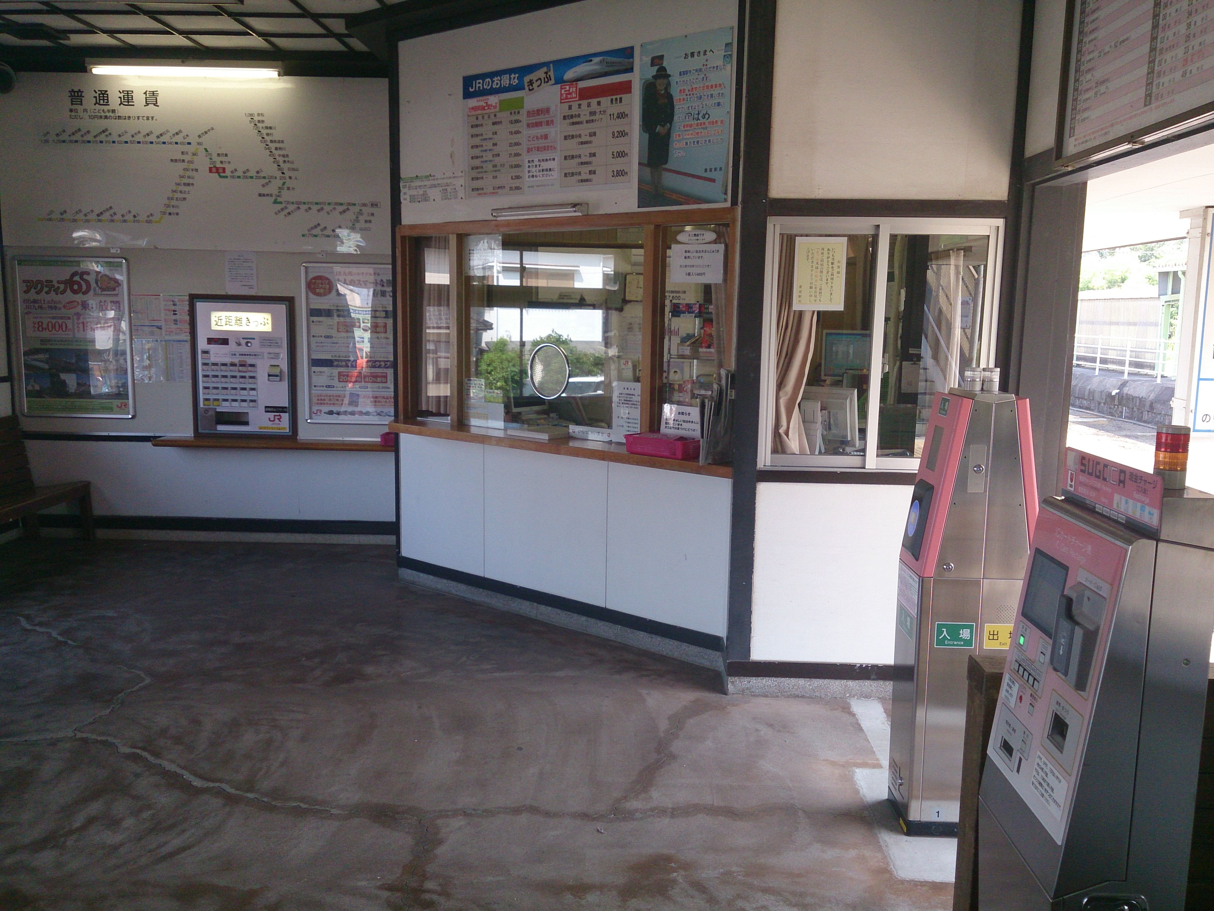 重富駅 駅構内